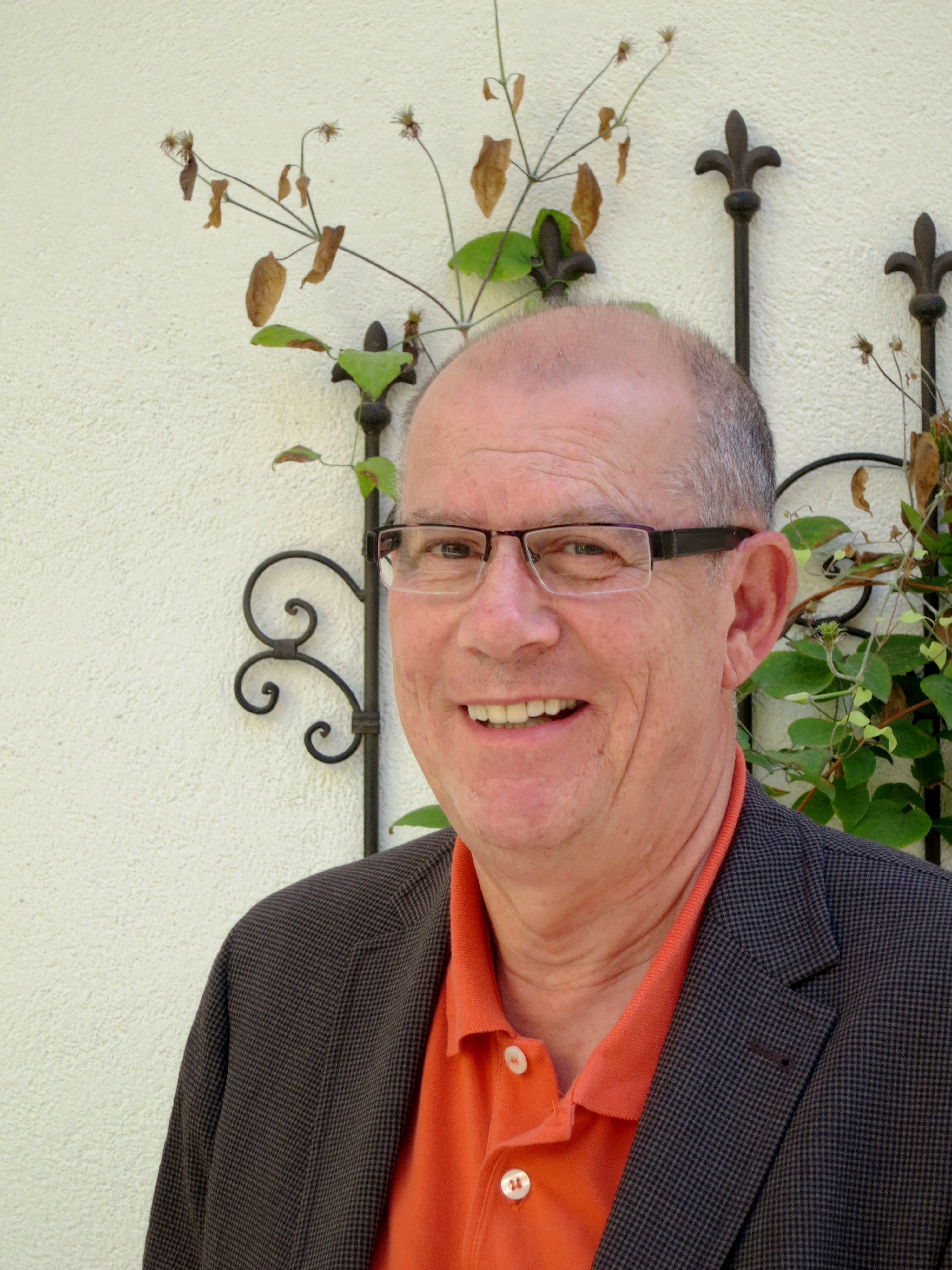 Wilhelm Liebhart im Juli 2014